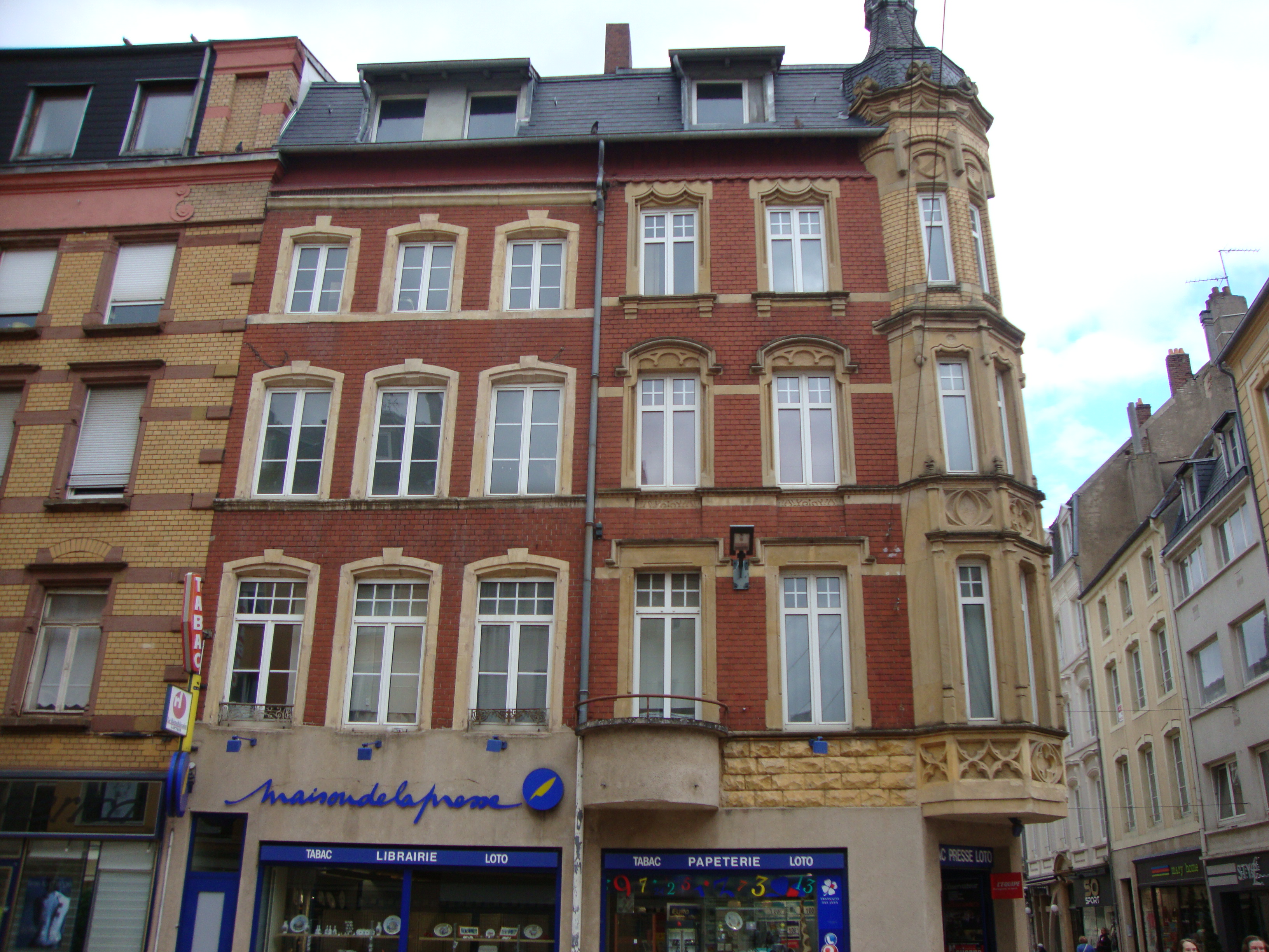 Thionville (57) - Maison, rue des Deux Places